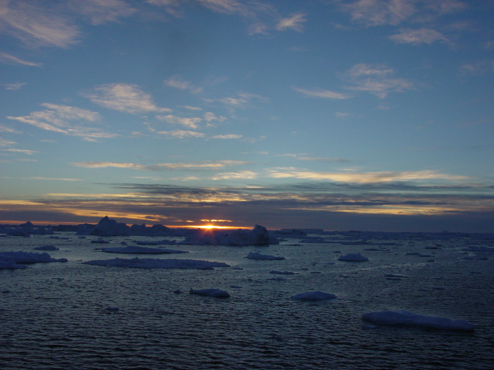 la magia de la naturaleza